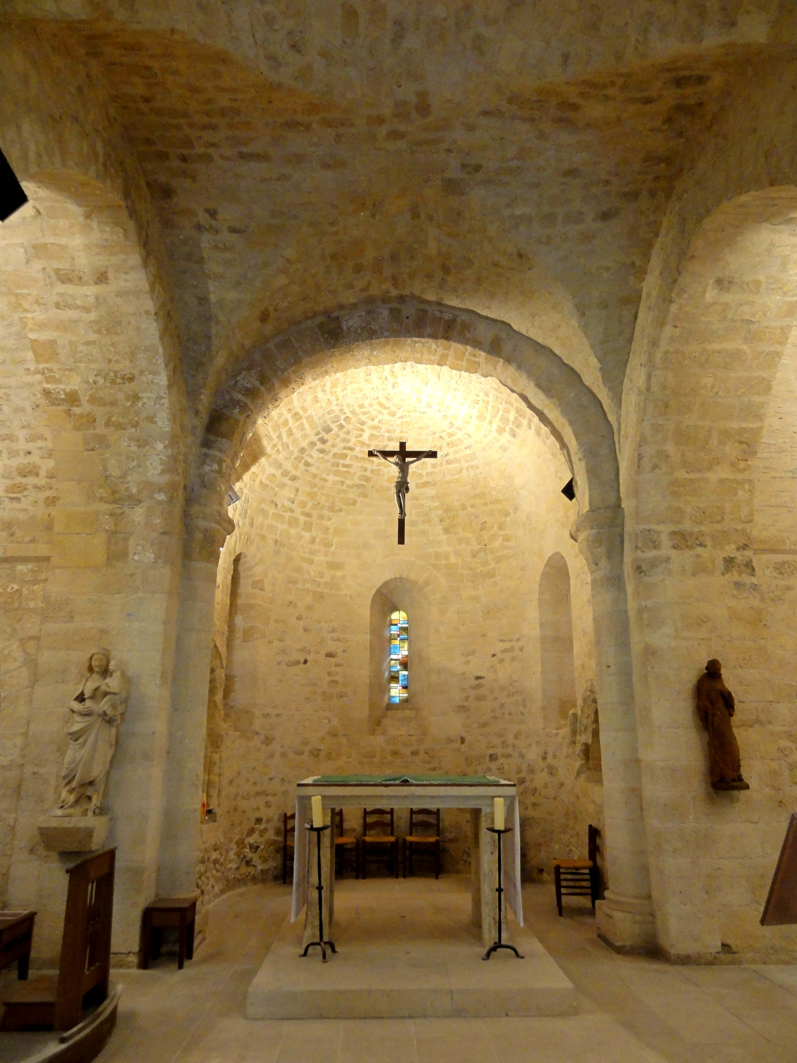 Intérieur de l'église - voir titre.